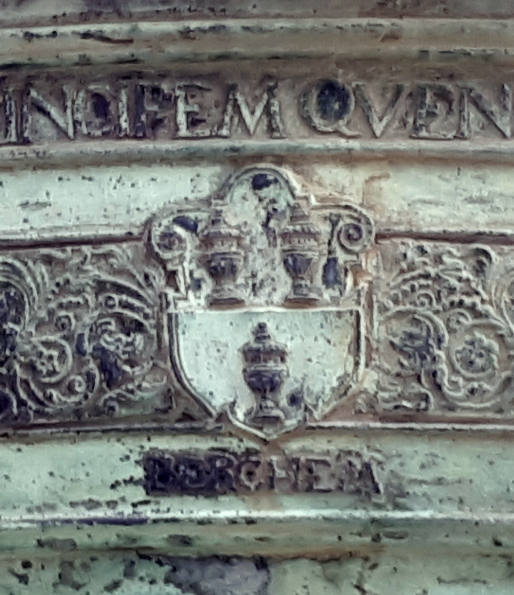 Wappen Bürgermeister Berchem an der Schale des Karlsbrunnens.